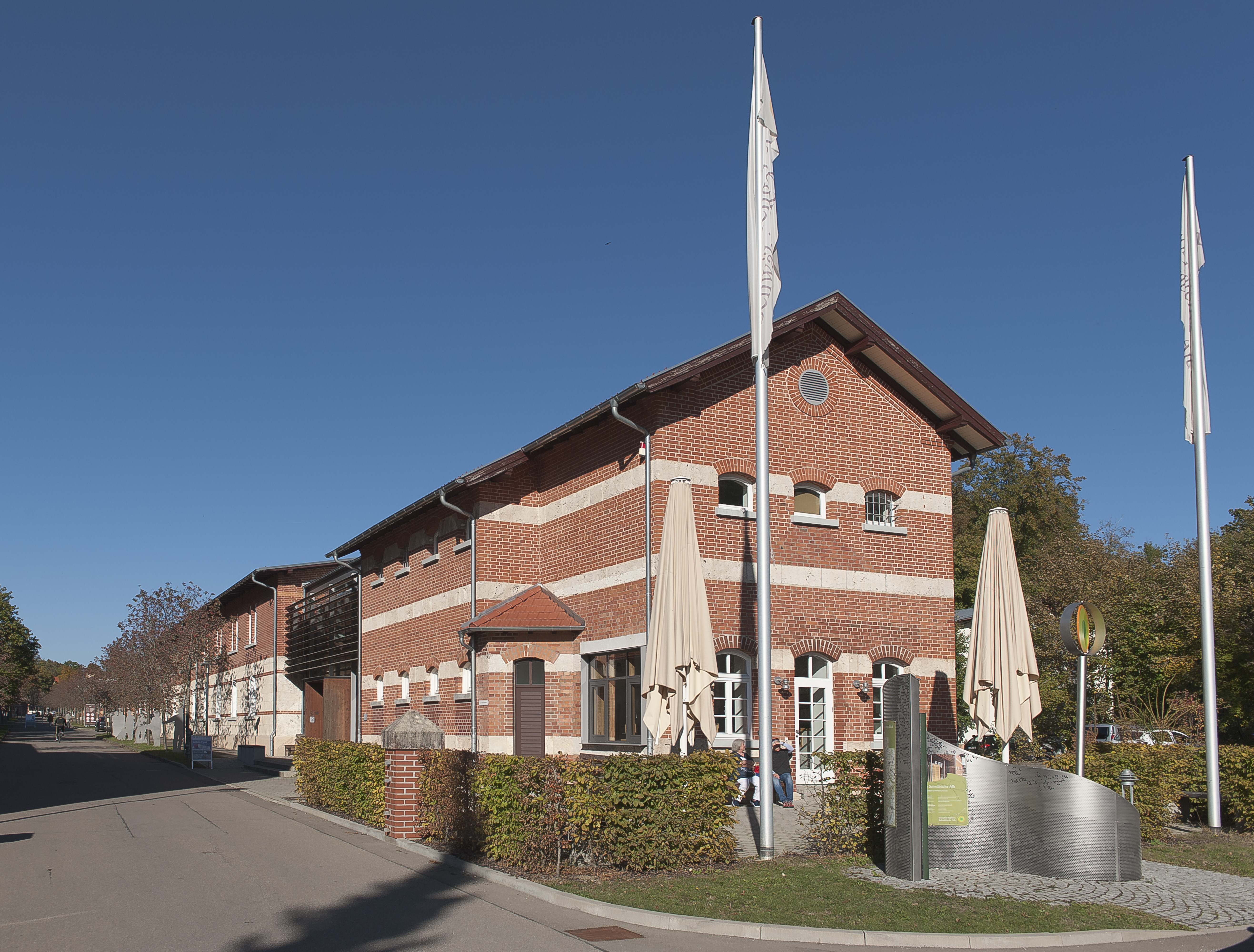 Informationszentrum für das Biosphärengebiet Schwäbische Alb, Altes Lager, Münsingen